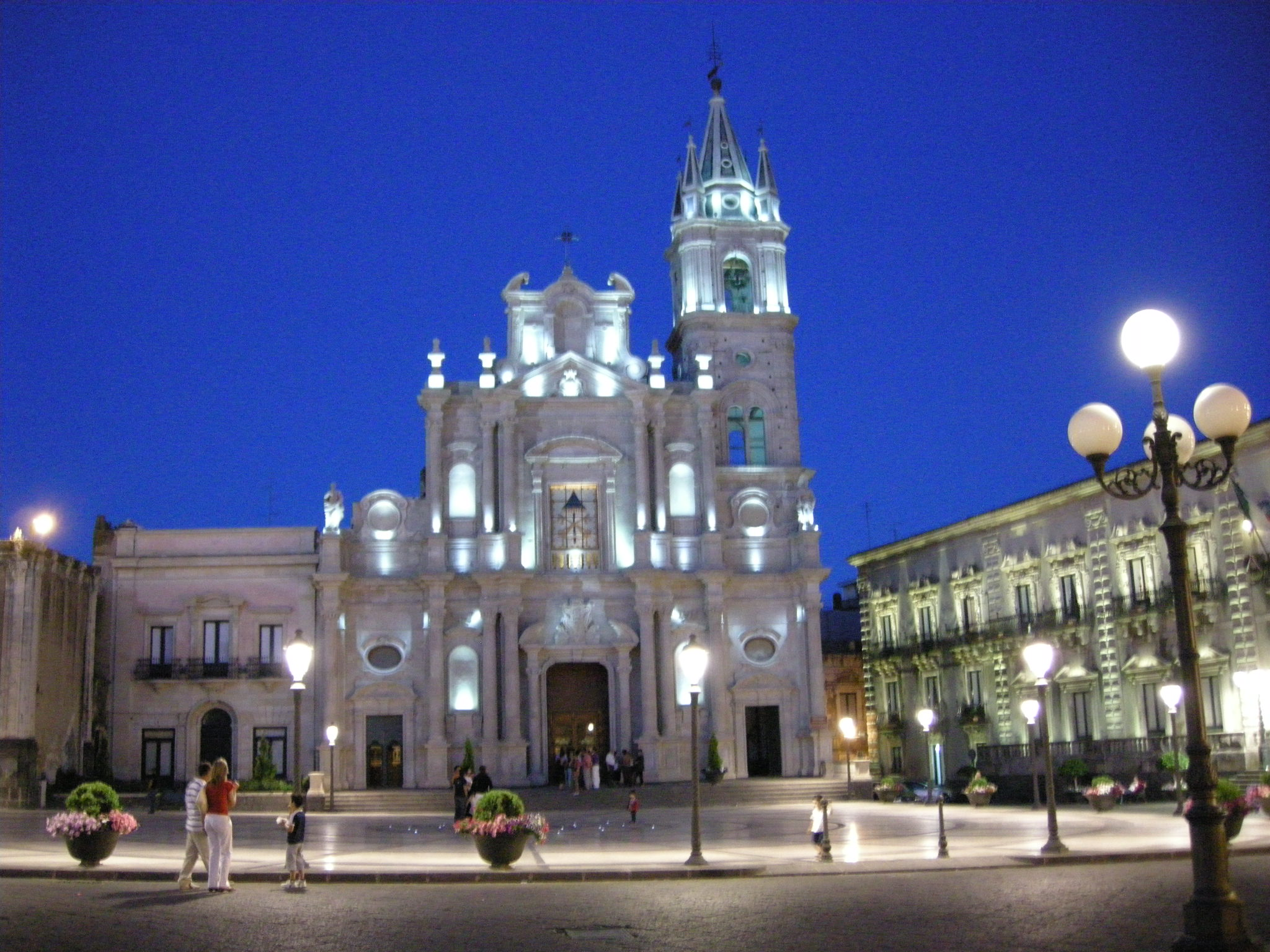 Acireale, basilica dei santi pietro e paolo